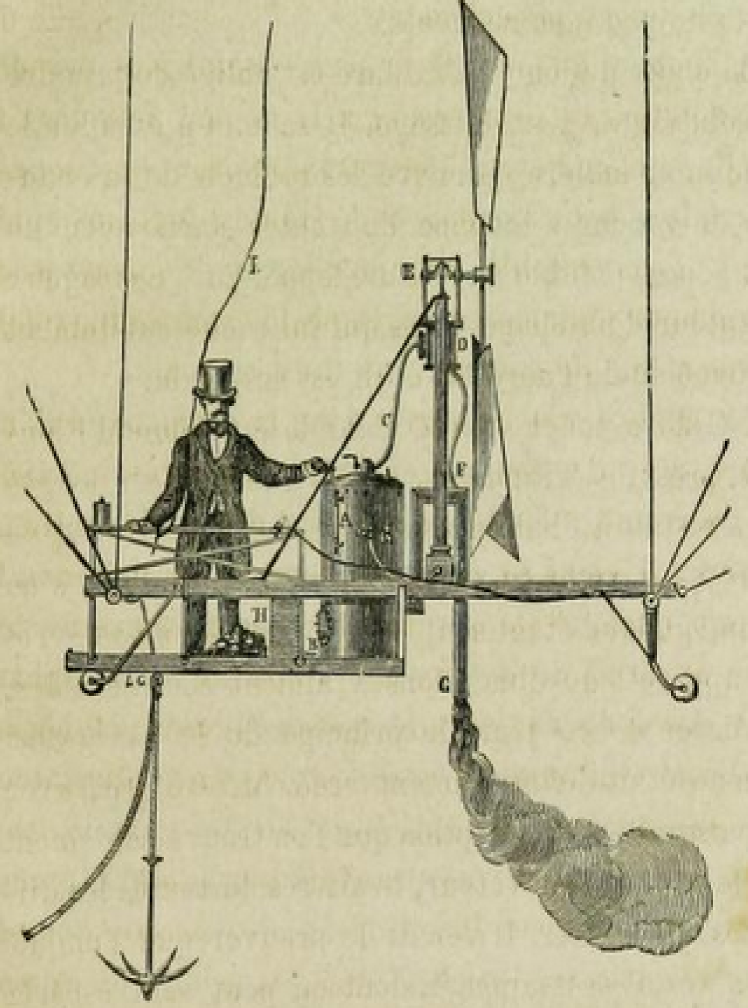 Gravure du XIXe siècle de Gaston Tissandier (1843-1899) représentant la machine à vapeur de l'aérostat en 1852 de Henri Giffard (1825-1882). A-B : chaudière à foyer renversé F-D : tuyau de cheminée avec jet de vapeur H : bâche à coke E : axe faisant agir l'hélice